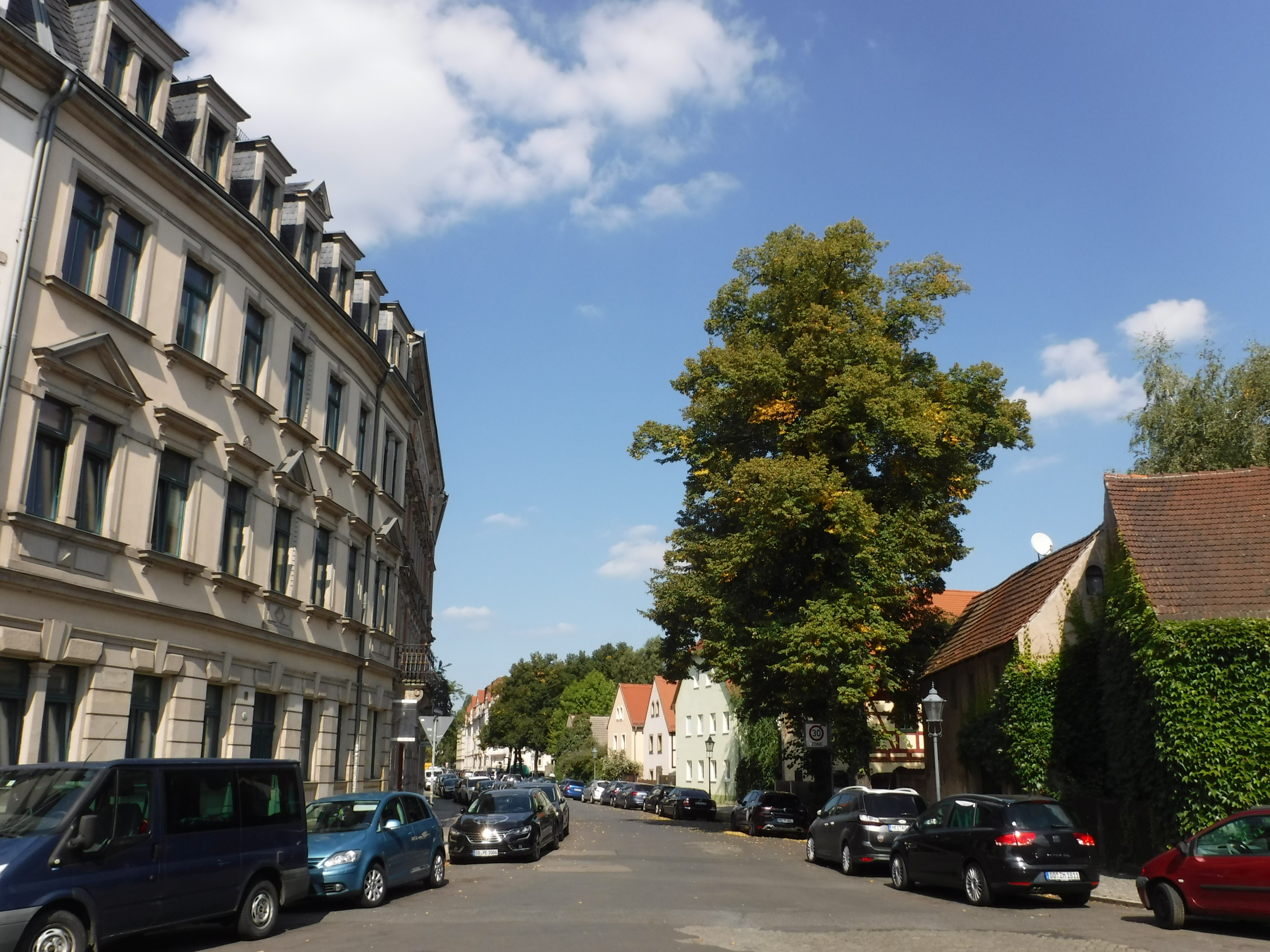 Straße "Altpieschen" in Dresden. Blick nach Norden